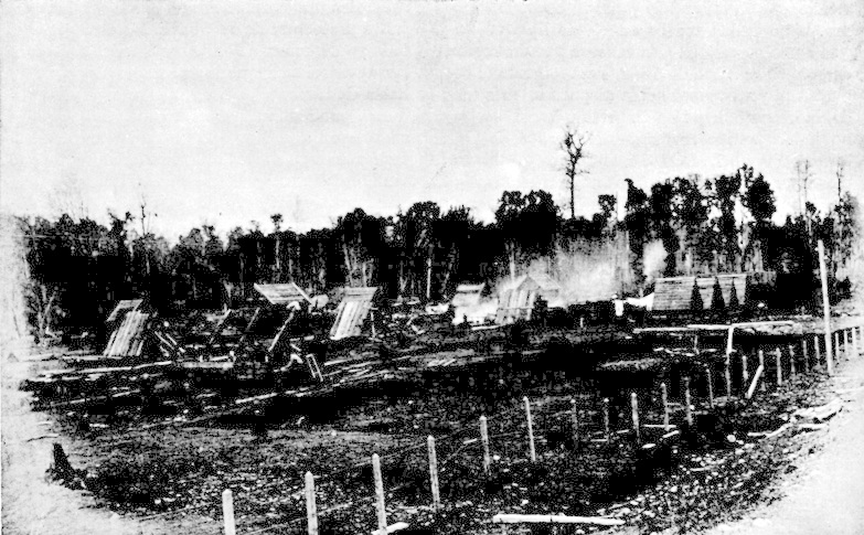 Imagen en Chile descripción física, política, social industrial y comercial de la República de Chile, por Carlos Tornero.1903